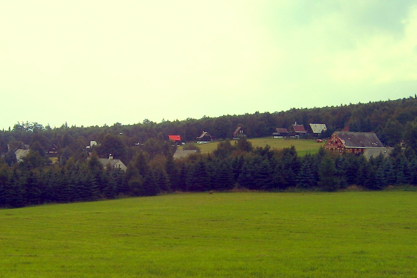 Ortschaft Sedlo (Tschechien)